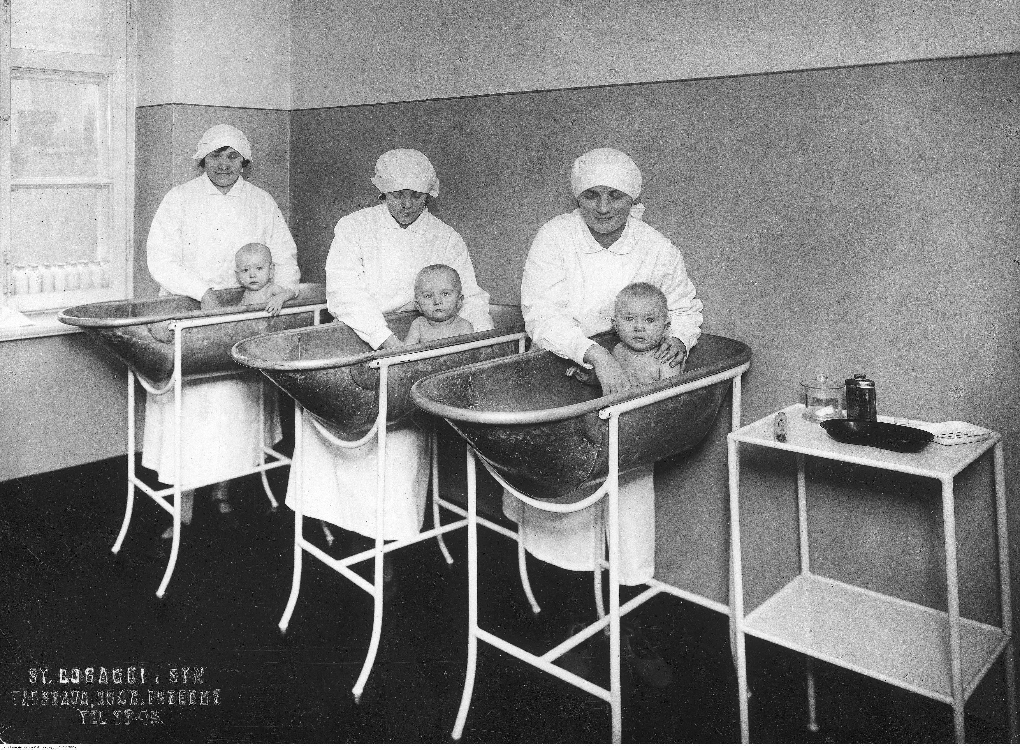 Troje dzieci kąpanych przez opiekunki.